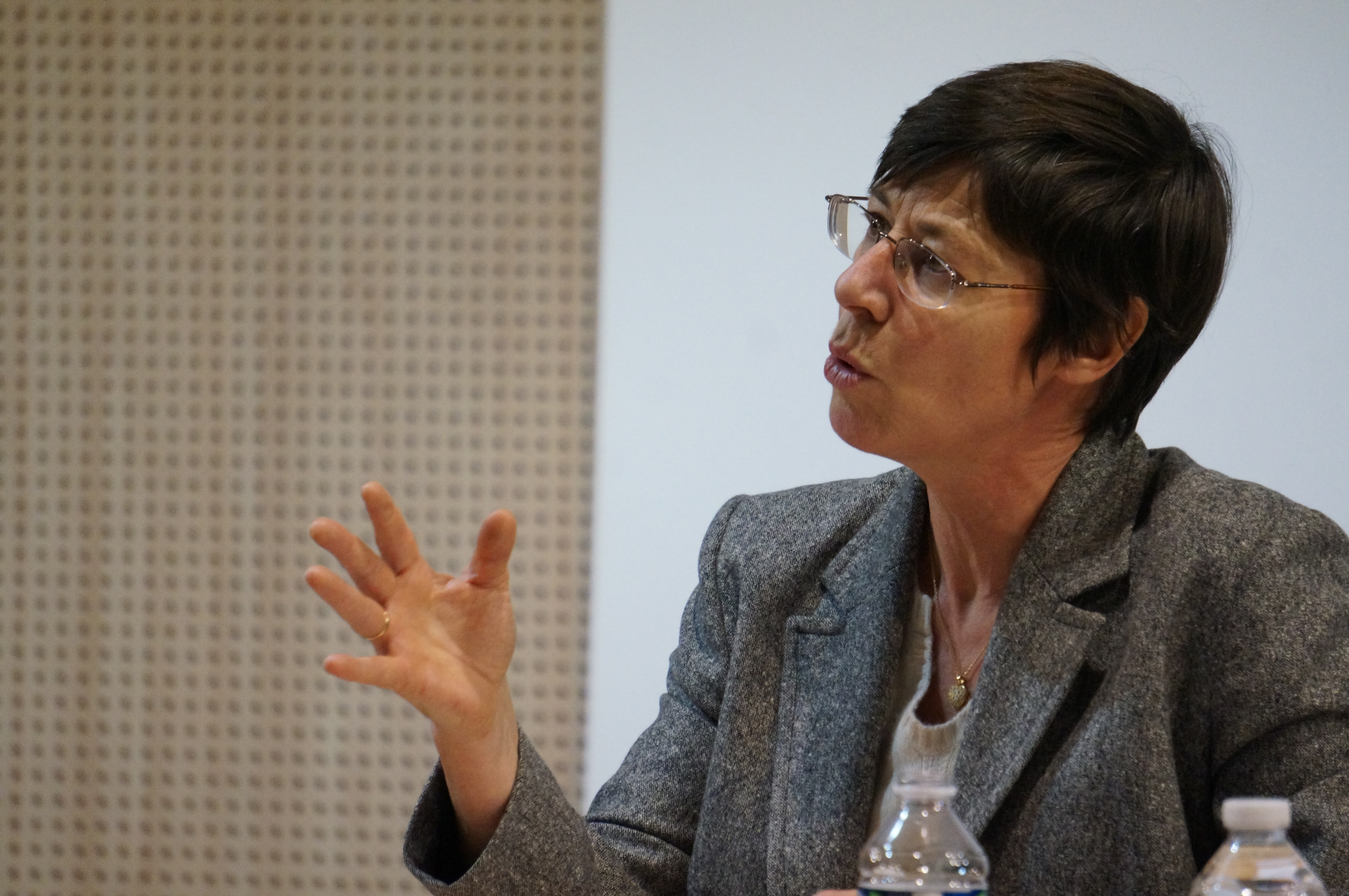 lors du colloque "imaginez la Paix en Europe" en 2015.